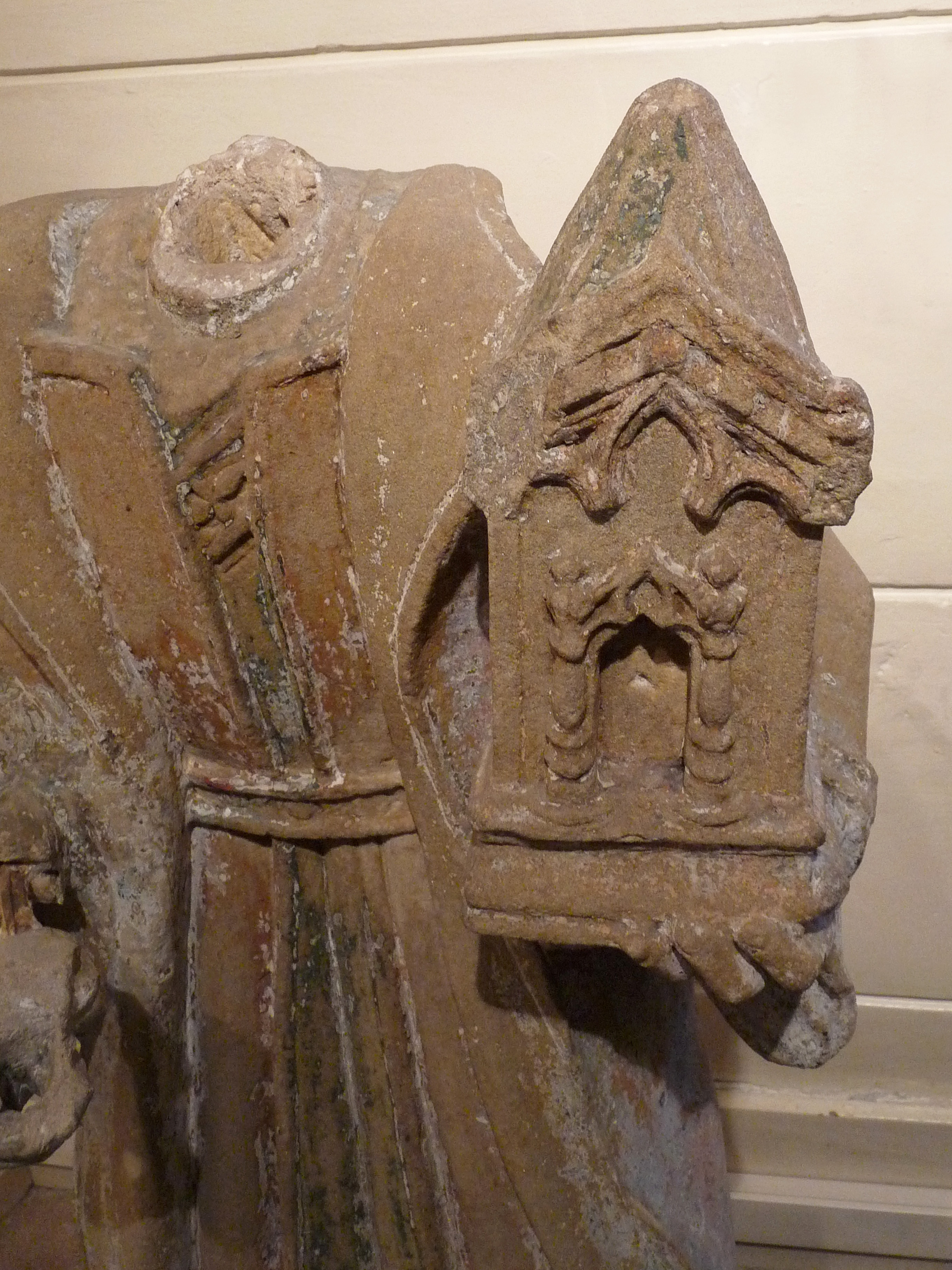 Détail de la statue en pierre (1ère moitié du XVIe siècle) de saint Romaric (Musée Charles de Bruyères, Remiremont). Polychrome à l'origine, la statue se trouvait dans l'ancien hôpital construit en 1724 et détruit en 1974.